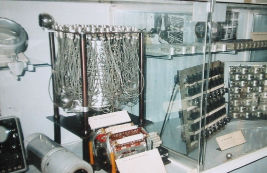 Magnetrommelspeicher des D4a von Prof. N. J. Lehmann. Schaukasten im Willersbau der TU Dresden.